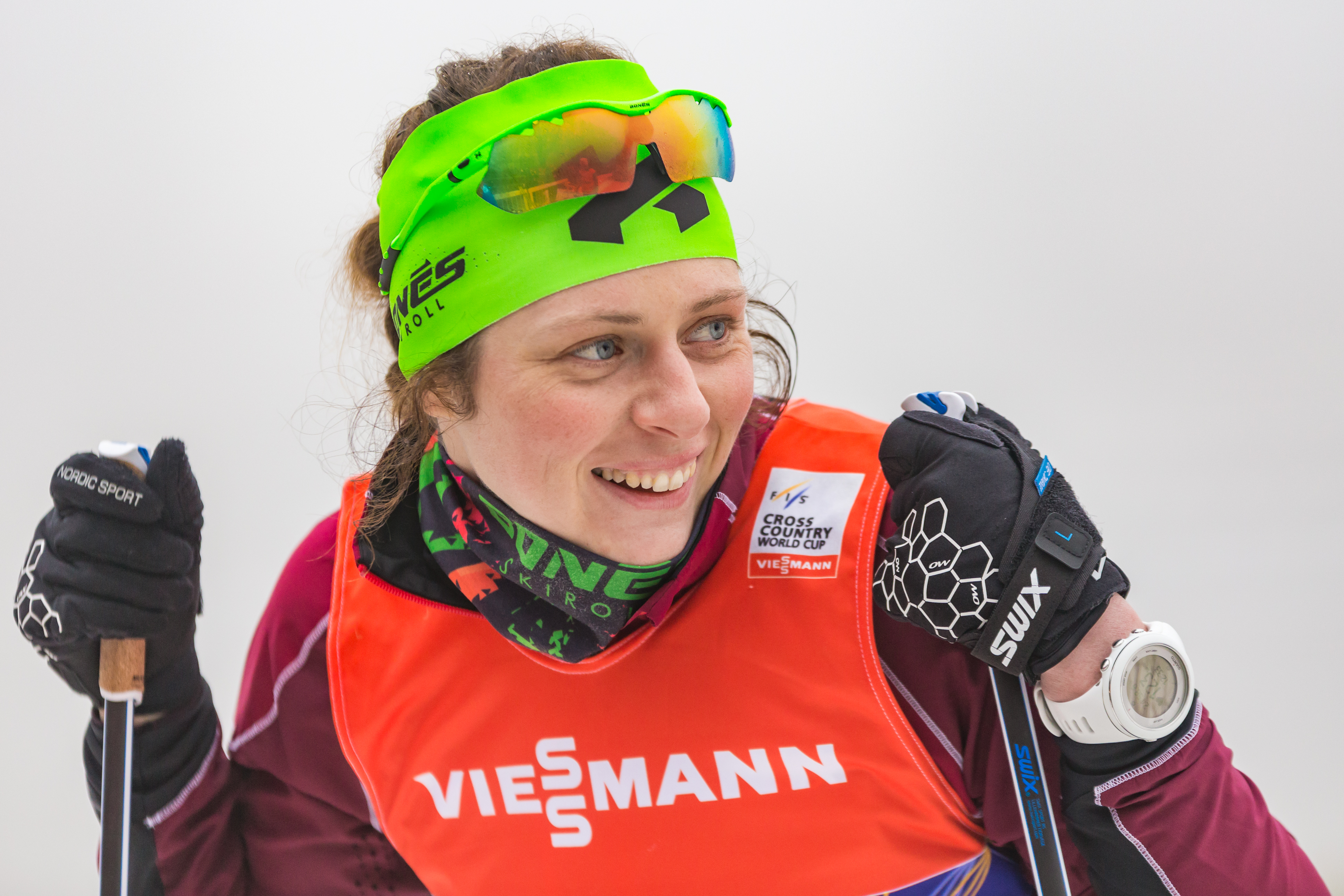 Vedrana Malec (CRO, Kroatien)